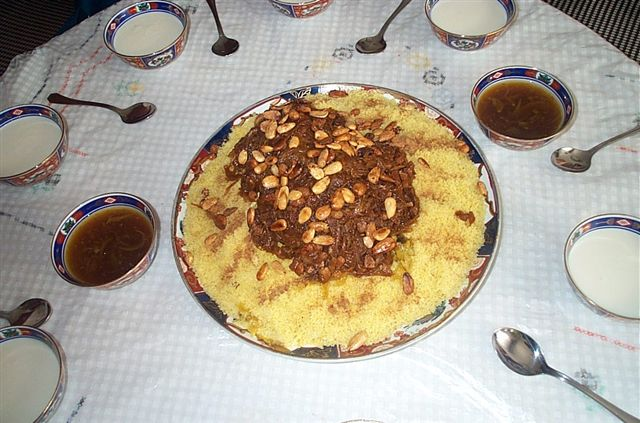 Mesa servida con cuscus